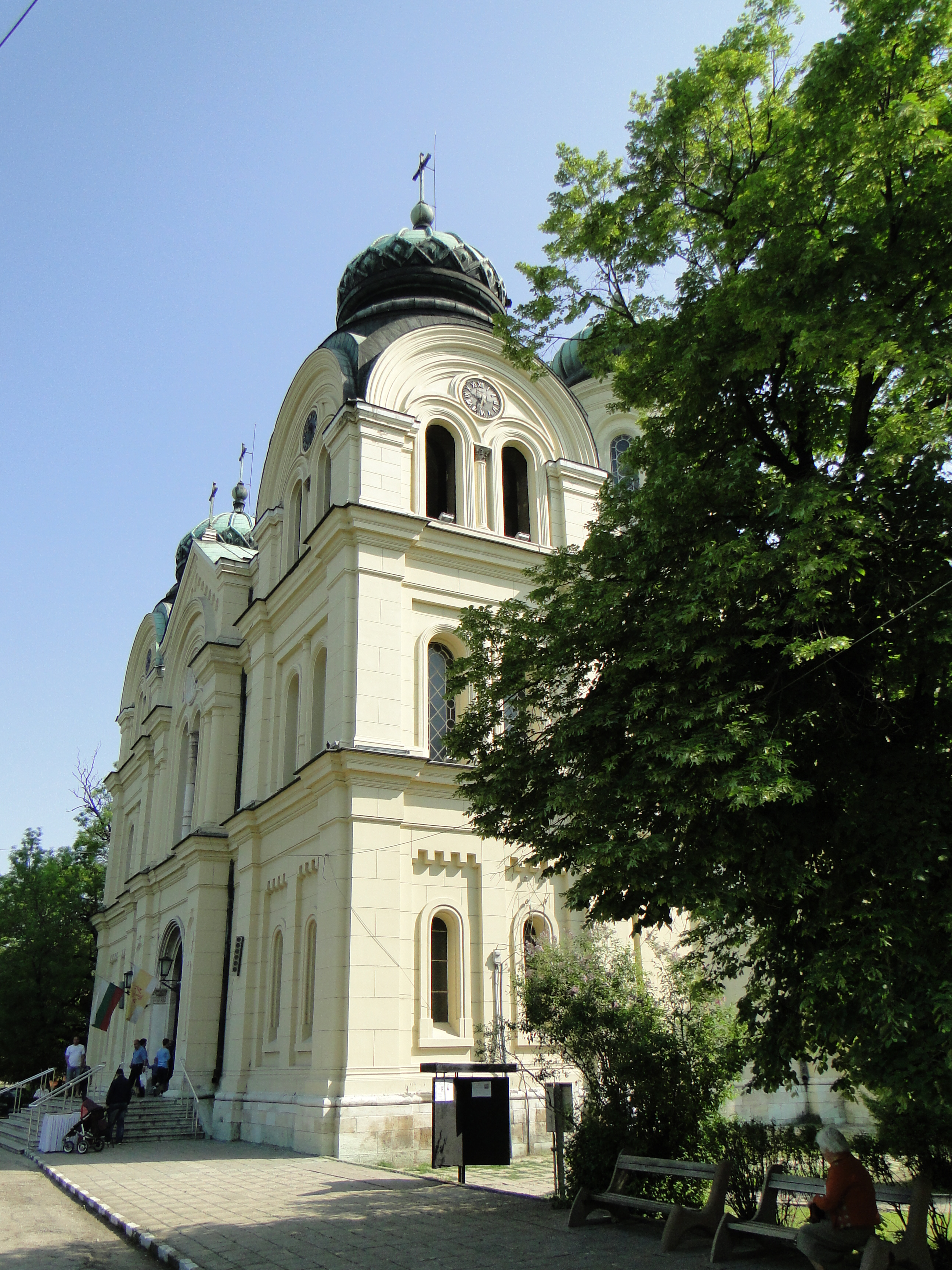 Видин, май 2013